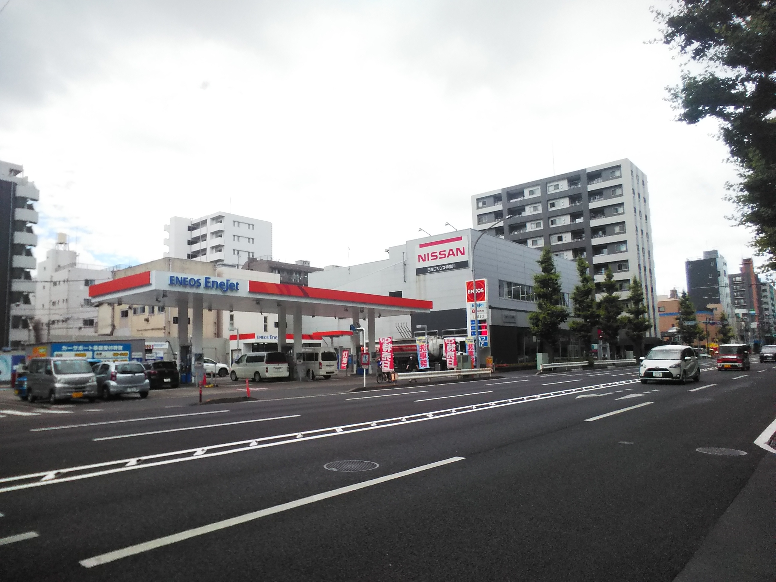 大桟橋通り、横浜市中区千歳町付近の街並み